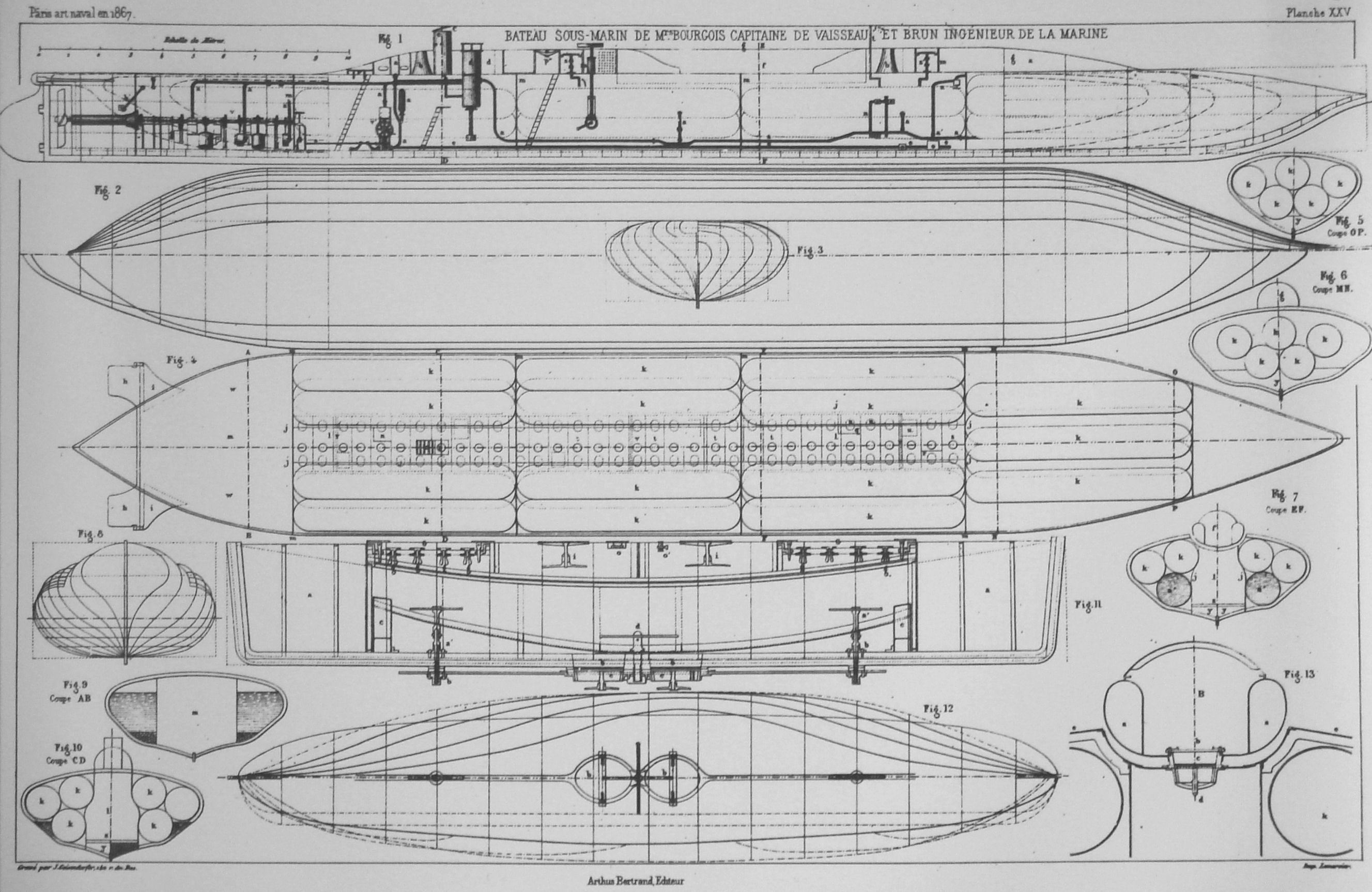 Le_Plongeur_plan.